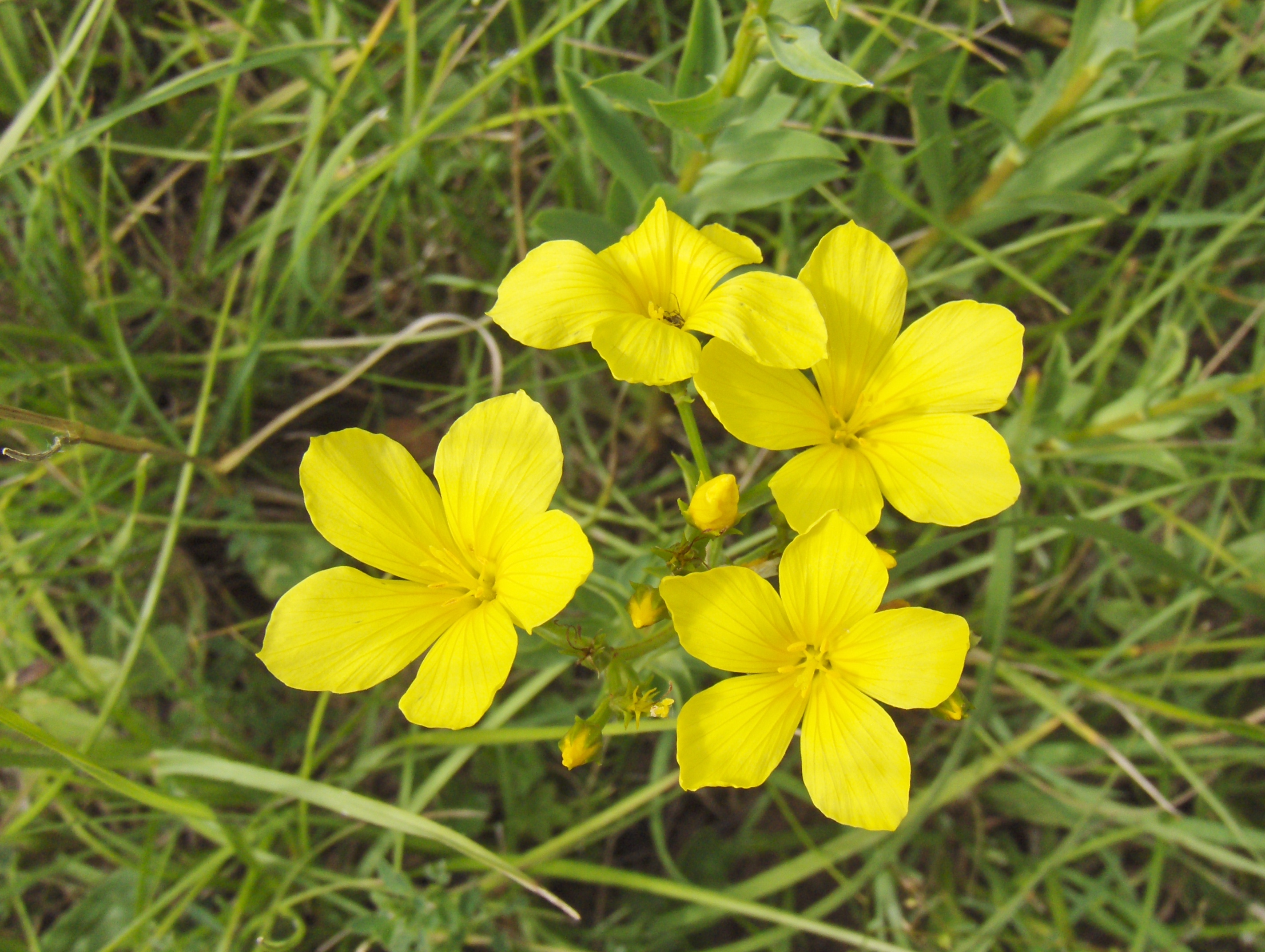 lokalita: CHKO Bílé Karpaty/Zahrady pod Hájem